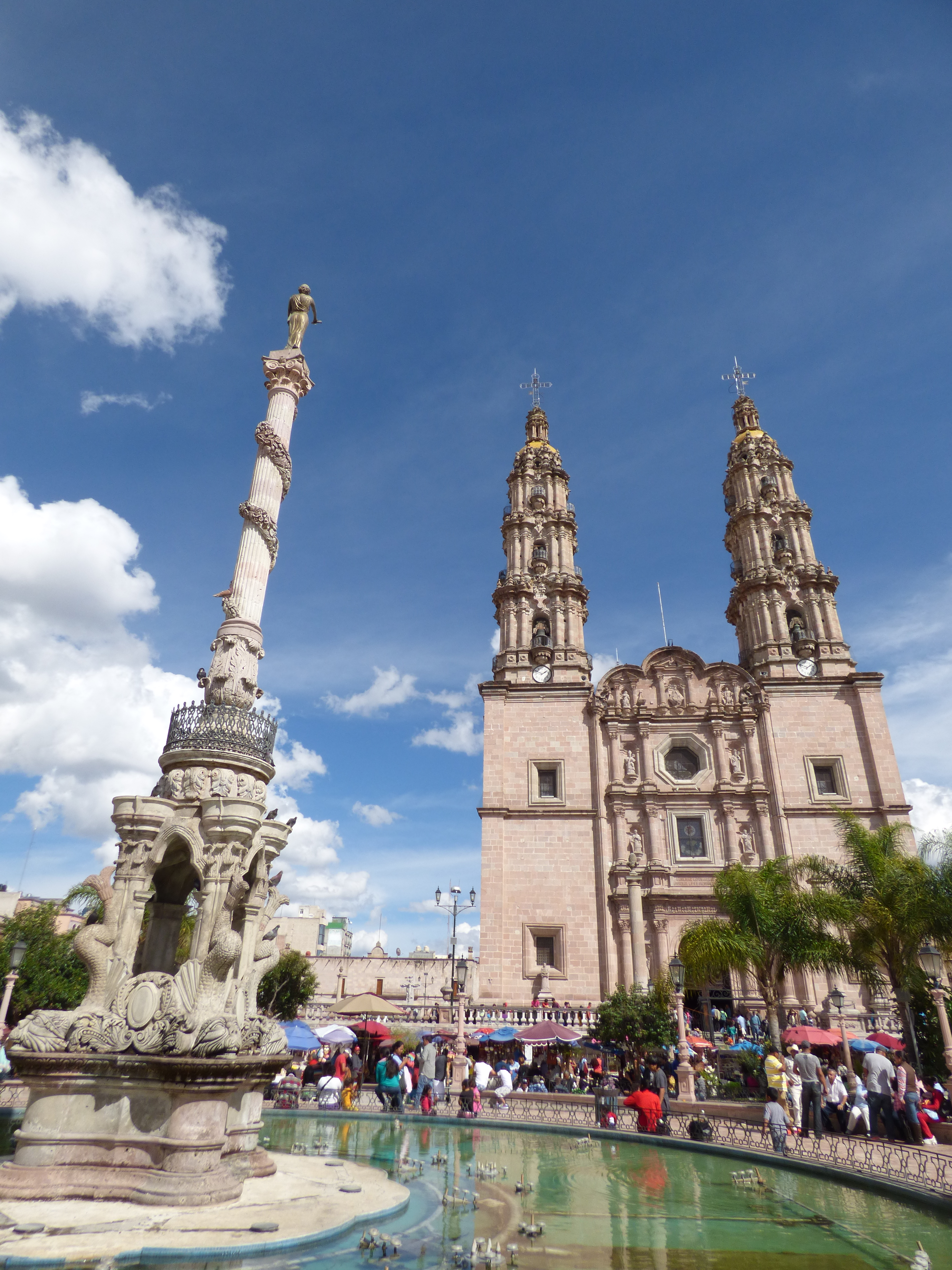 Fachada de la Catedral Basílica de Nuestra Señora de San Juan de los Lagos